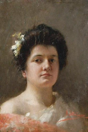 "Ritratto di giovane signora", olio su tavola, 32 x 21.50 cm., collezione privata